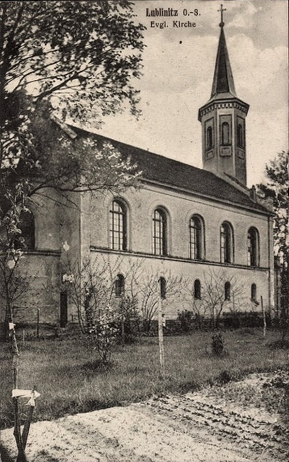 Stary kościół ewangelicki w Lublińcu, zdjęcie z lat 1910-1915